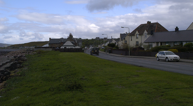 Ardersier Village